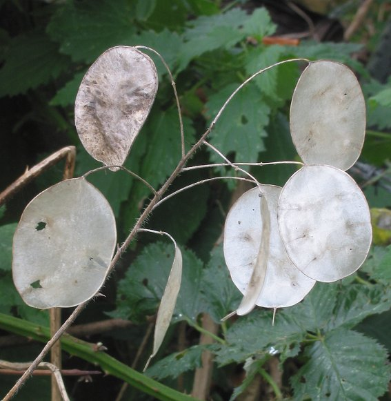 zelfgemaakte foto van vruchten (hauwtjes) van Judaspenning; half oktober